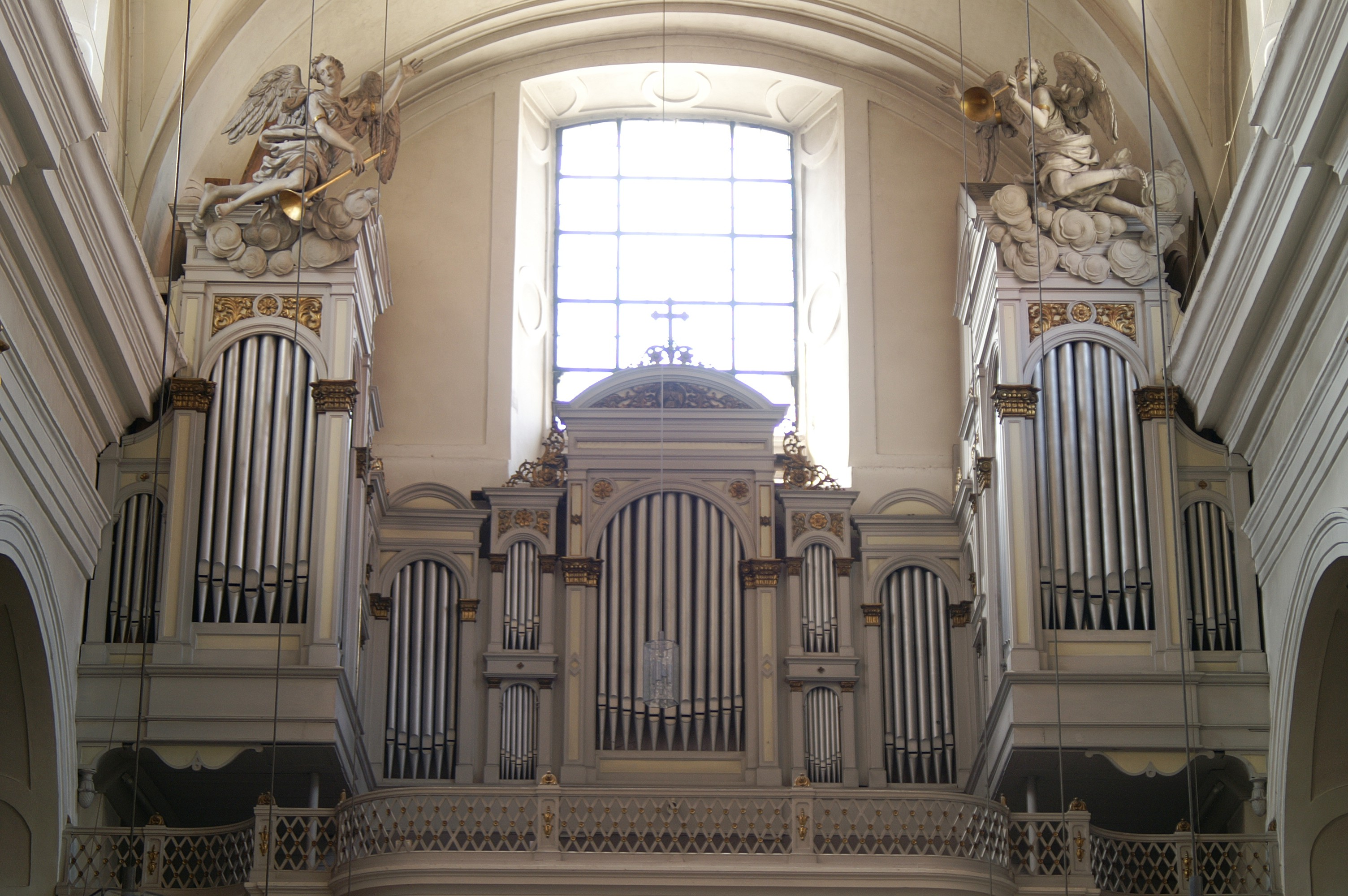 Orgel der Kirche St. Josef, erbaut von Wilibald Siemann